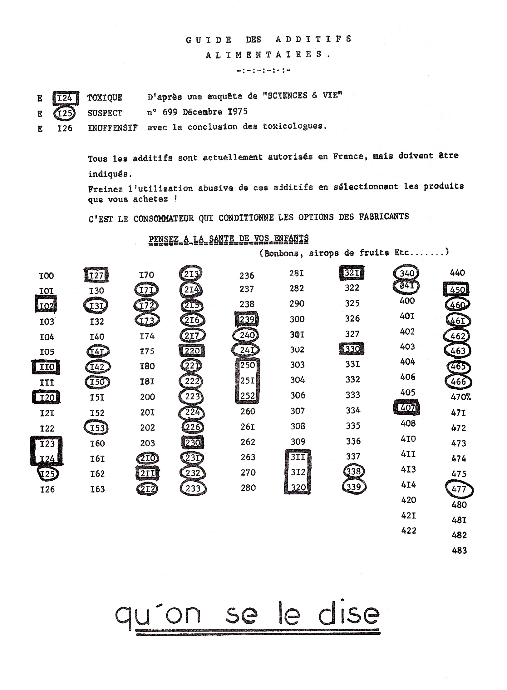 Version primitive du "tract de Villejuif" (ne mentionnant pas l'hôpital de Villejuif), une liste d'additifs alimentaires faussement présentés comme dangereux. Copie reproduite dans : Véronique Campion-Vincent et Jean-Bruno Renard, Légendes urbaines - rumeurs d'aujourd'hui, documents Payot, ISBN 2-228-88604-1